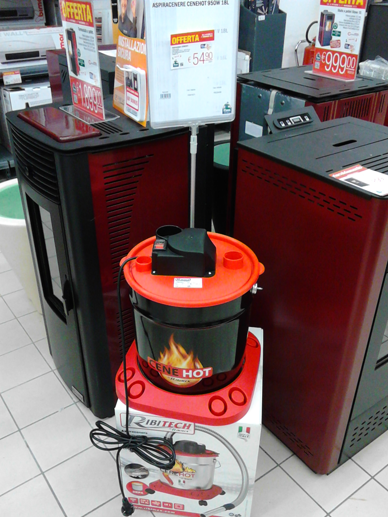 Aspiracenere per stufe e camini